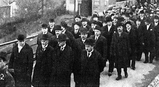 D'Begriefnes vum Jean-Pierre Bausch. Original caption: "J.P. BAUSCH STARB DEN BERGMANNSTOD -- Die Ageordnetenkammer im Trauerzug."